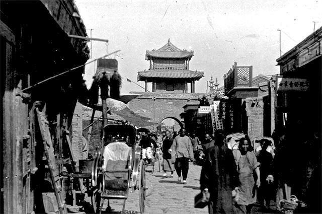 1900年前后的天津